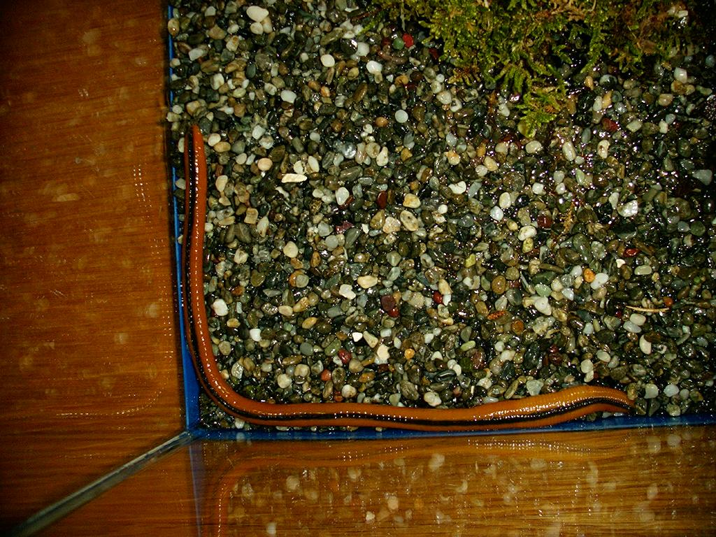 Orbdella octonaria：ヤツワクガビル 2001/05/23 和歌山県田辺市：Tanabe City. Wakayama Pref. Japan